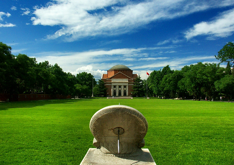 清華大禮堂以及草坪還有日晷